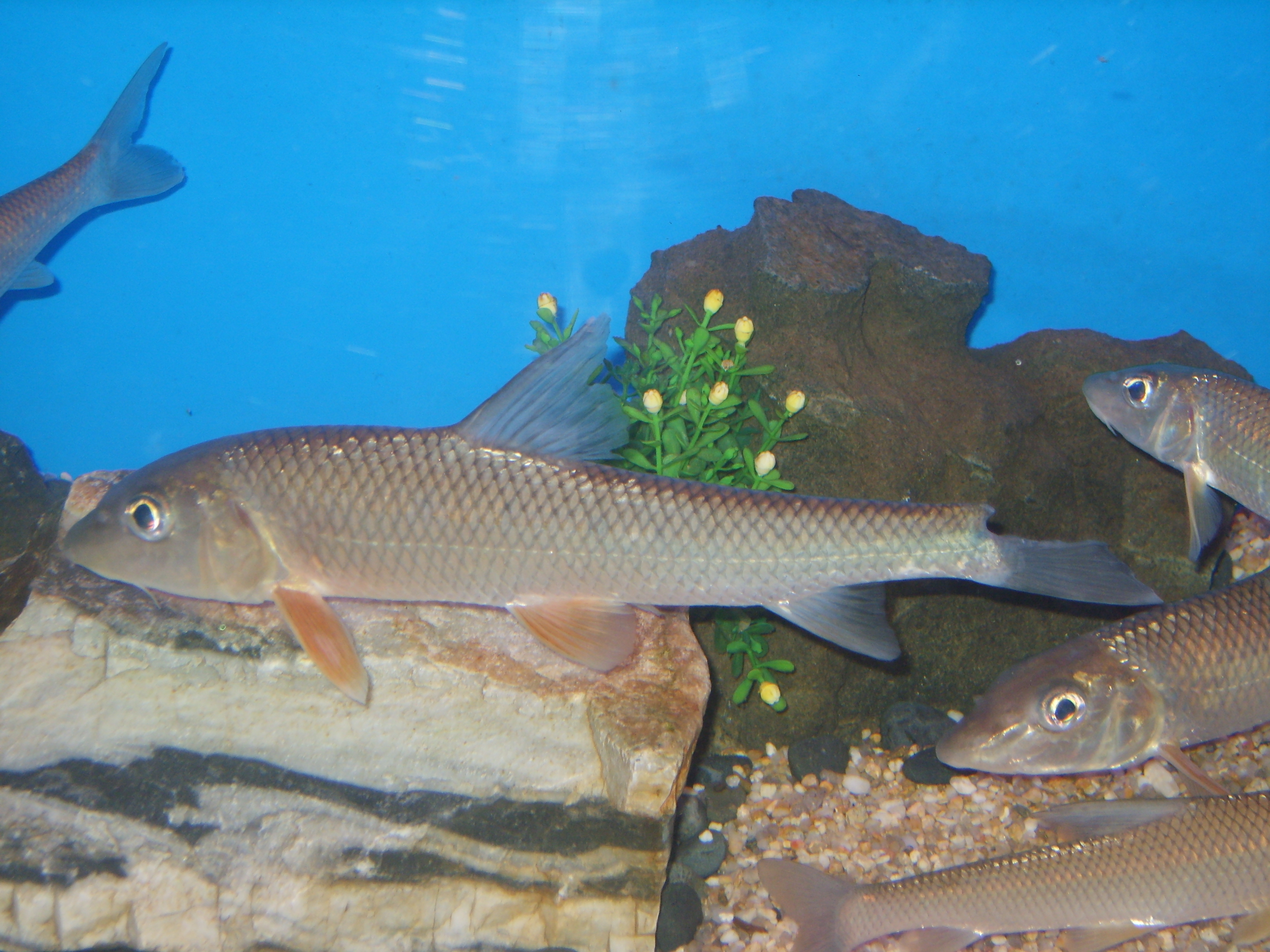 Hemibarbus labeo in Hampyung Korea. 함평 나비축제에 전시된 누치